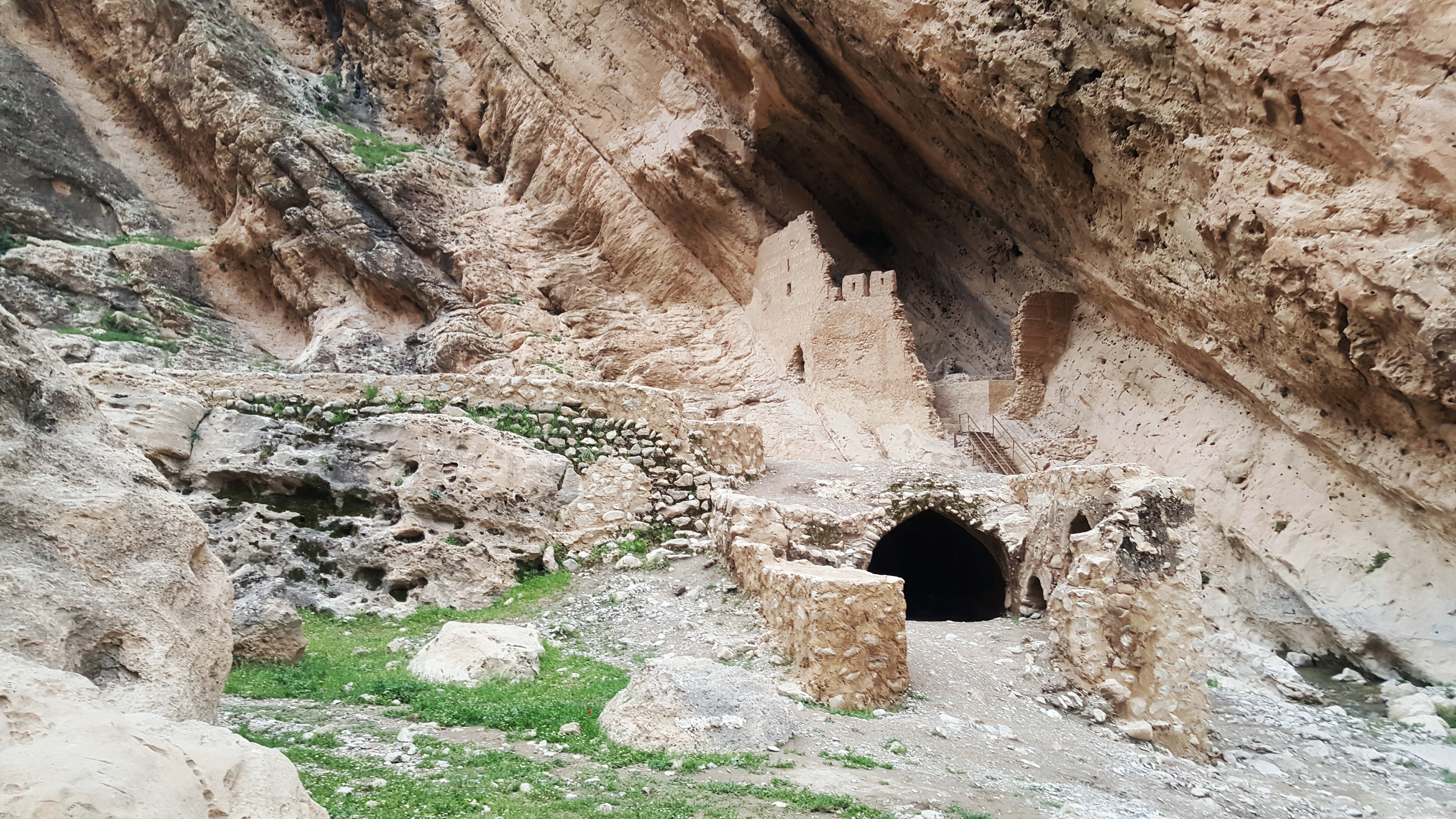 قلعه فرهنگی/ تاریخی/ شیخ مکان